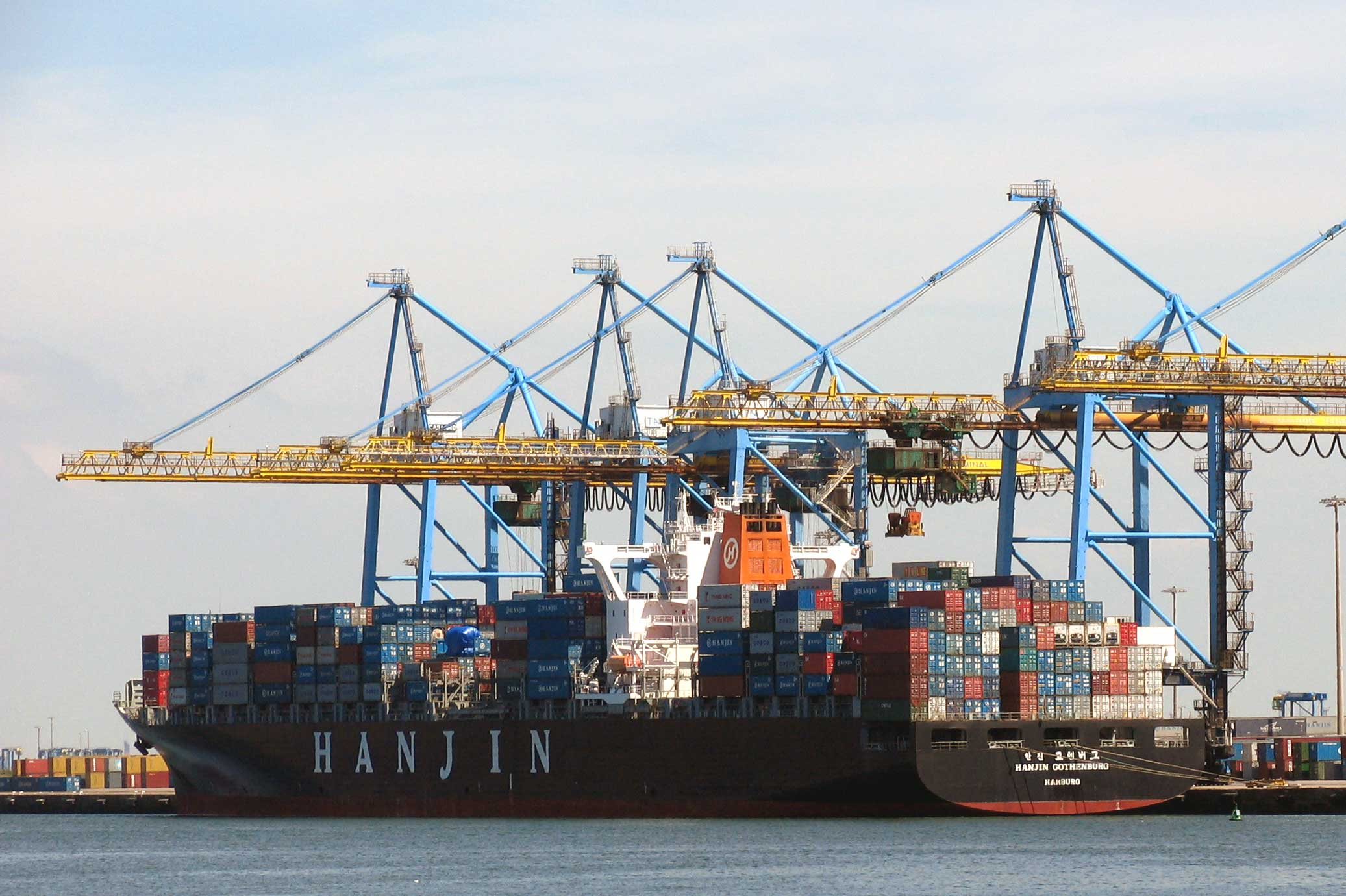 Description : Porte conteneur Hanjin Gothenburg au port du Havre Lieu : Le Havre, France Date : 2006 Author : Pline photo ou réalisation (schéma) personnelle